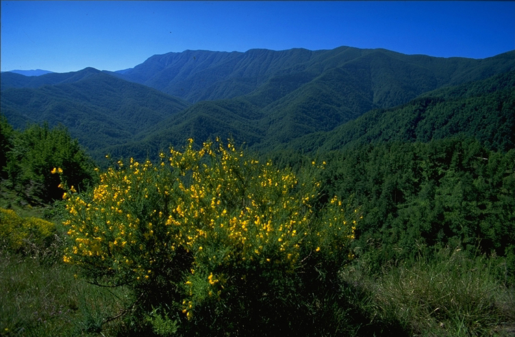 Nevio Agostini, scatto proprio, Alta Valle del Bidente Crinale Riserva Integrale Sasso Fratino, caricata da utente lineagoticafight autorizzato dall'autore